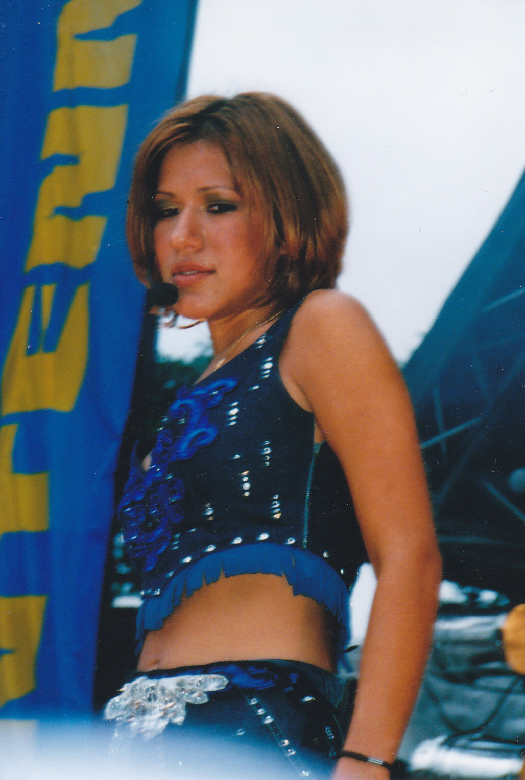 Vanessa Petruo "Vany" von den No Angels